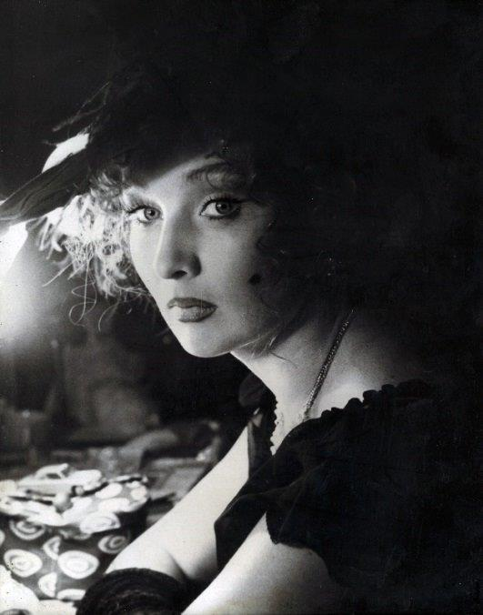 Спектакль "Последние", Надежда - Светлана Головина, Театр им. А.С.Грибоедова (Тбилиси), 1976 г.